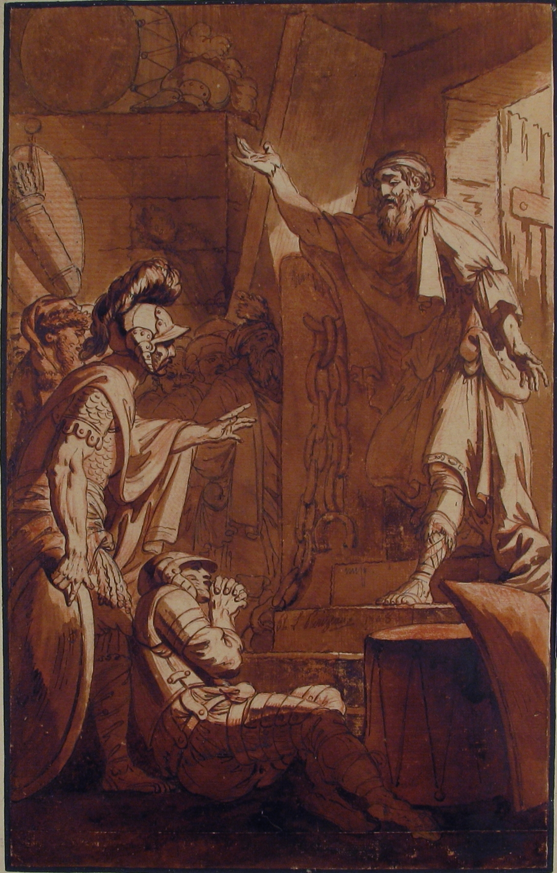 Drawing; Drawings